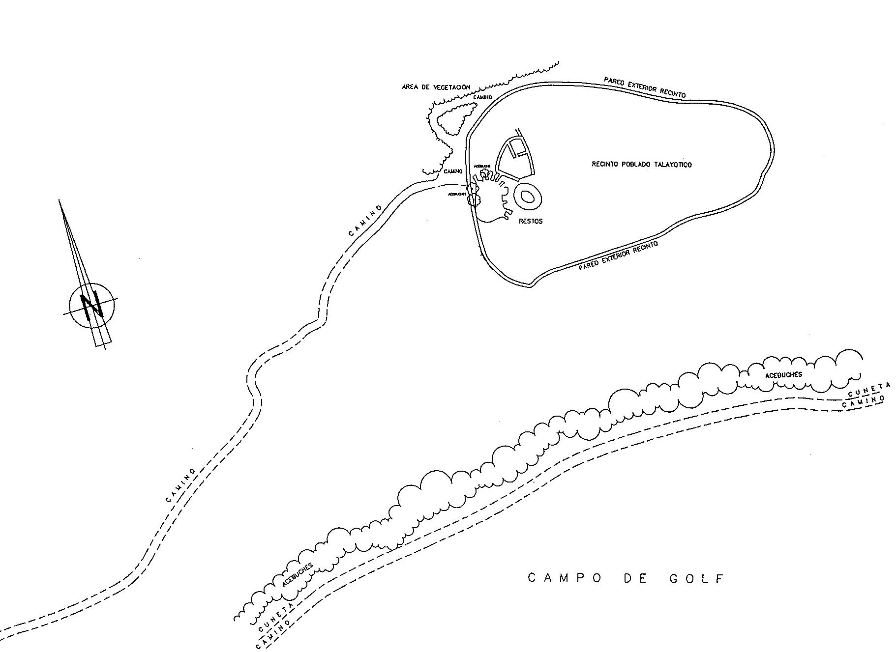 Es claper des Gegant